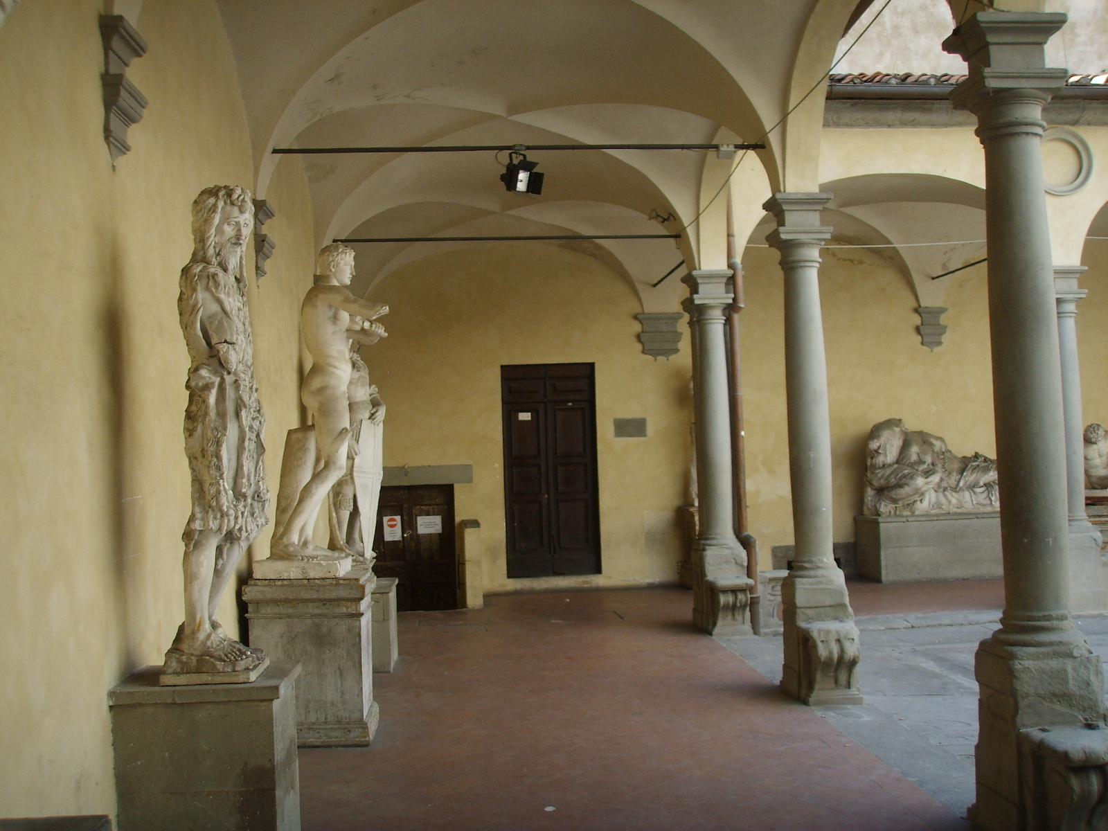 Accademia di Belle arti, cortile